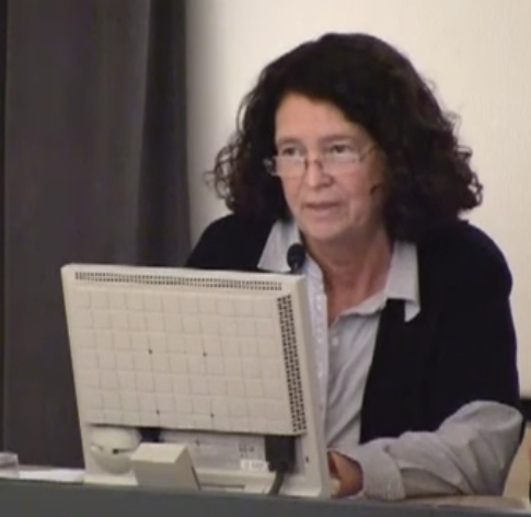 Helena Calsamiglia junto a una pantalla durante el debate "La ciència com a argument de venda", parte del ciclo “Calaix de la Ciència” de la UPF